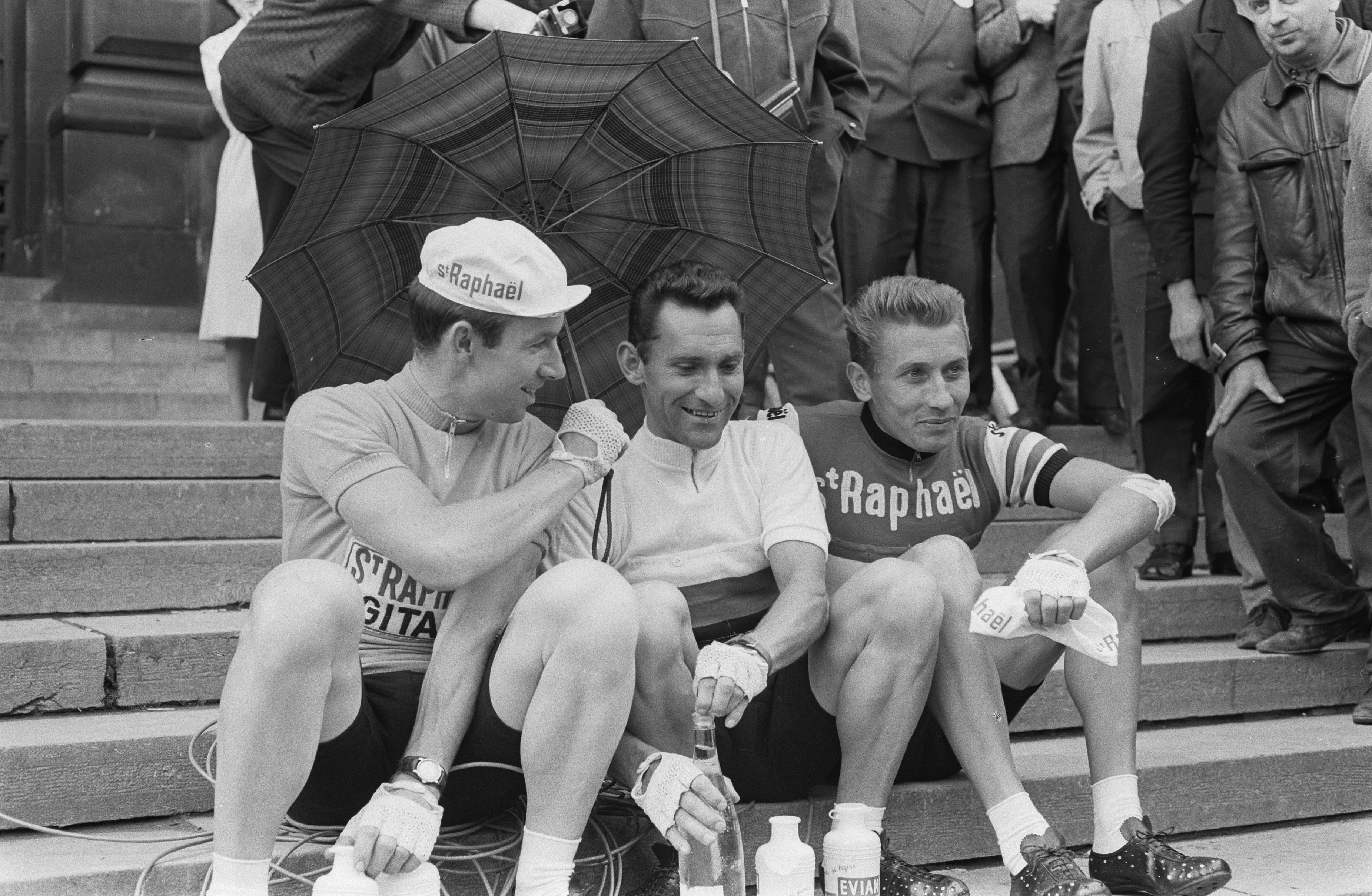 Collectie / Archief : Fotocollectie Anefo Reportage / Serie : Tour de France 1963 Beschrijving : Voor de start. Seamus Elliott, Jean Stablinkski en Jacques Anquetil onder een paraplu Datum : 27 juni 1963 Trefwoorden : sportmanifestaties, wielersport, wielrennen Persoonsnaam : Anquetil, J., Elliott, S., Stablinski, J. Fotograaf : Harry Pot / Anefo Auteursrechthebbende : Nationaal Archief Materiaalsoort : Negatief (zwart/wit) Nummer archiefinventaris : bekijk toegang 2.24.01.05 Bestanddeelnummer : 915-3084